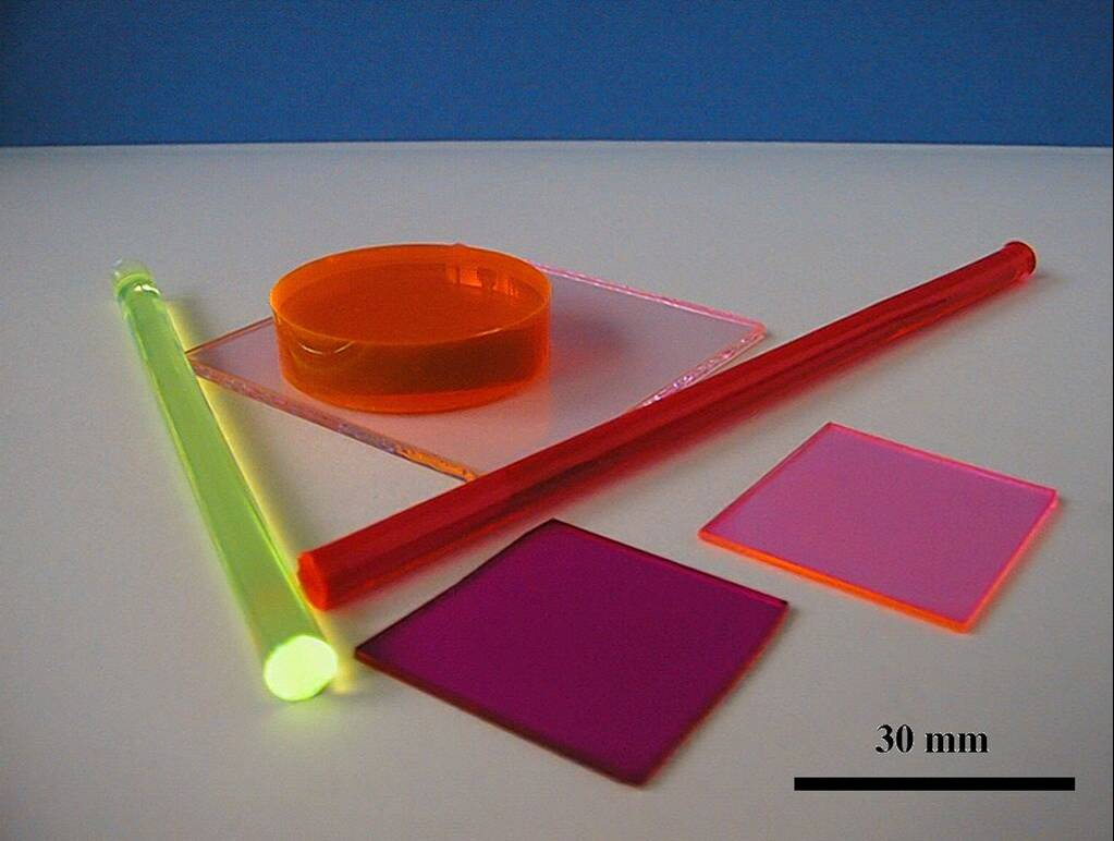 Echantillons de xérogels dopés avec des molécules colorées sous forme de monolithes ou de films minces (Echantillons F. Chaput, CNRS-Ecole Polytechnique). Auteur : Frédéric Chaput. Licence GFDL Frédéric Chaput